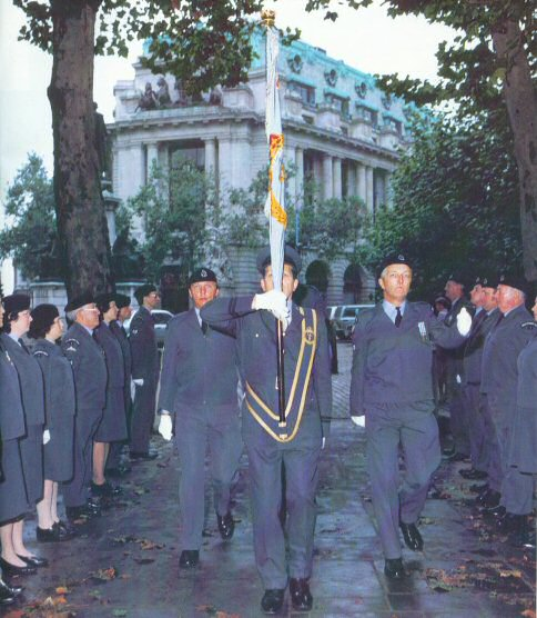 ROC Banner at St Clement Danes